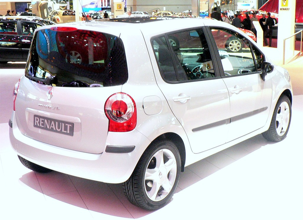 Mondial de l automobile de Paris (October 2006)